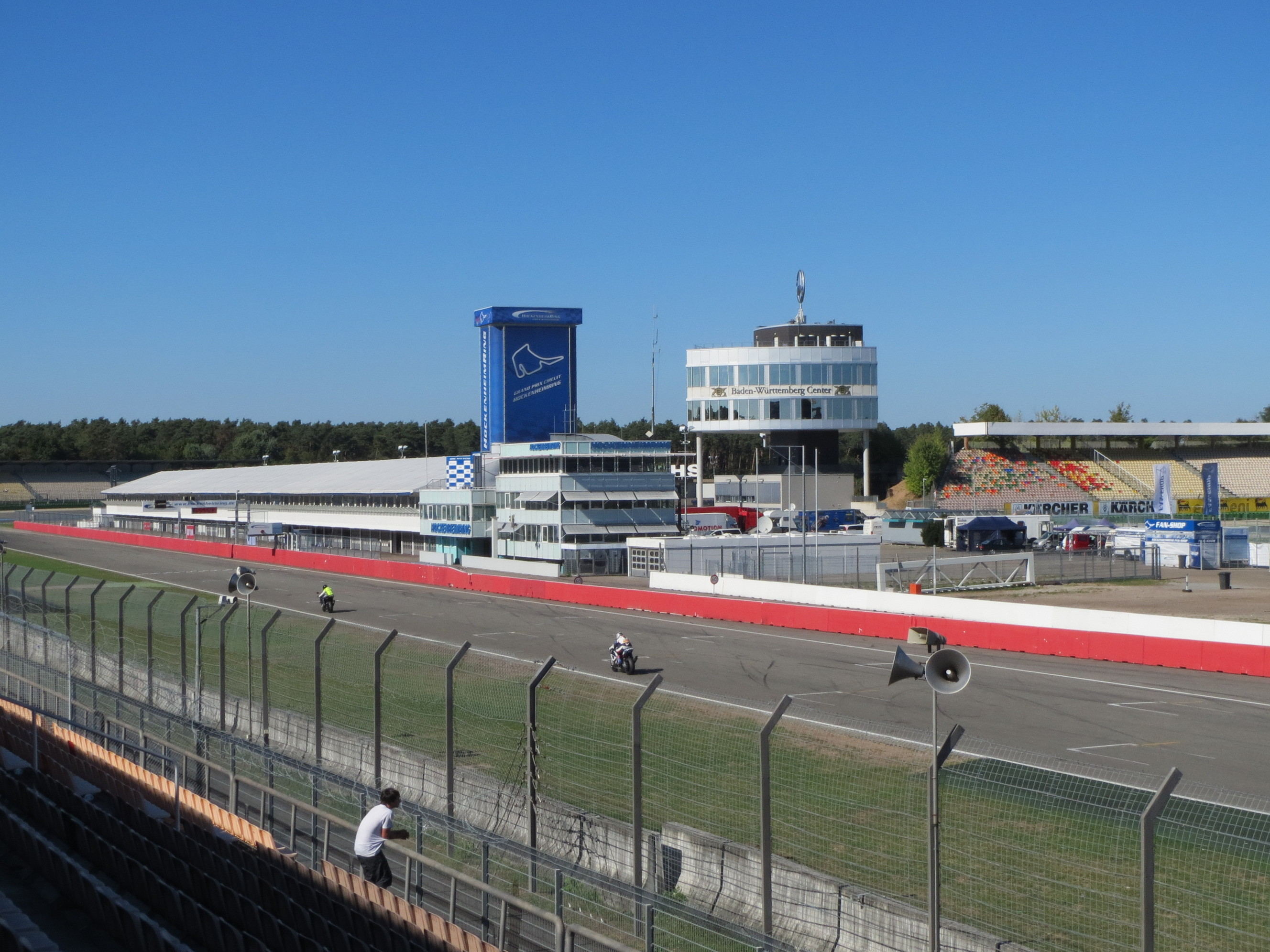 Hockenheimring